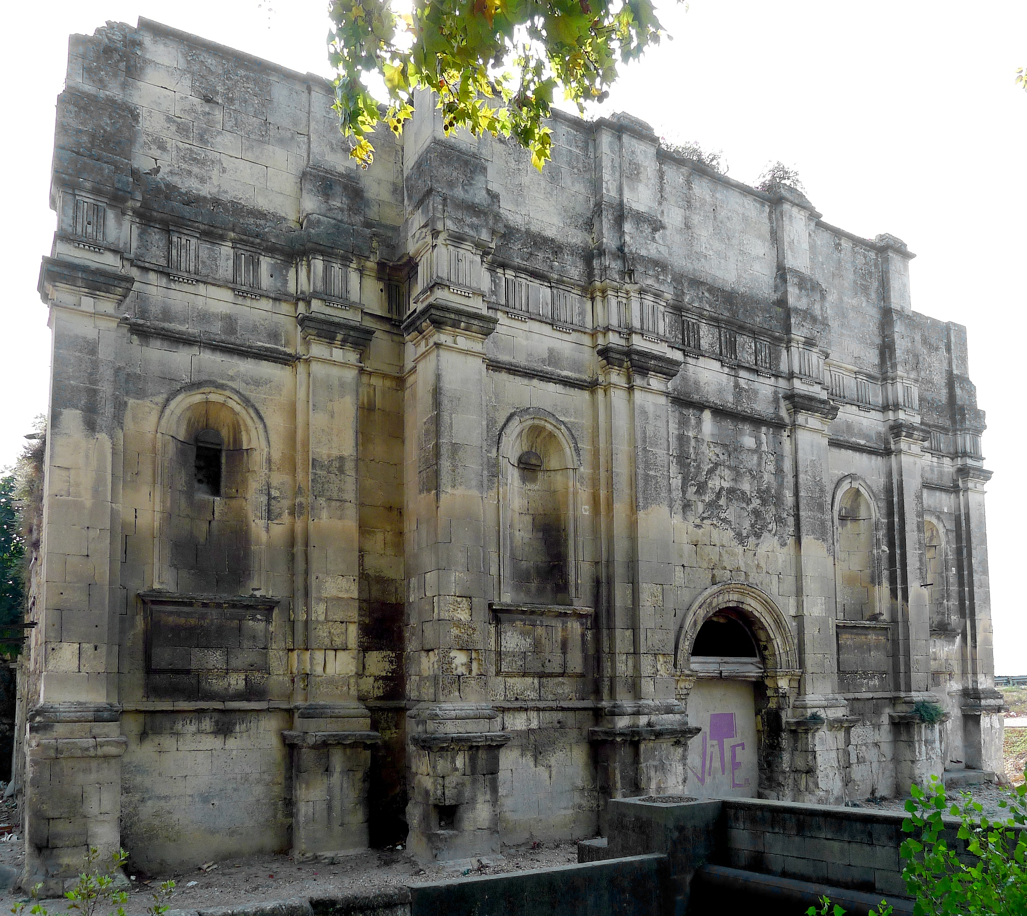 Eglise des Carmes déchaussés (vestiges), boulevard Sixte-Quenin - Arles (Bouches-du-Rhône) .